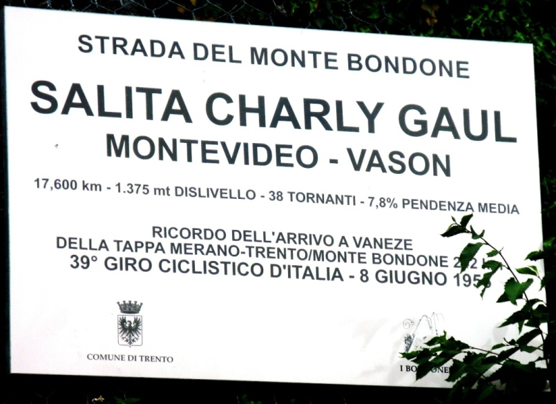 Affiche al Erënnerung un de Charly Gaul, an der Opfaart vun der Strada del Monte Bondone.